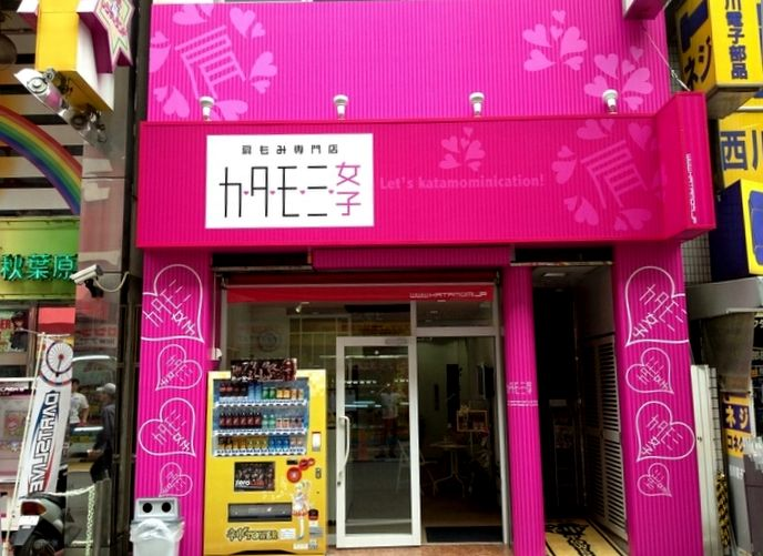 秋葉原カタモミ女子